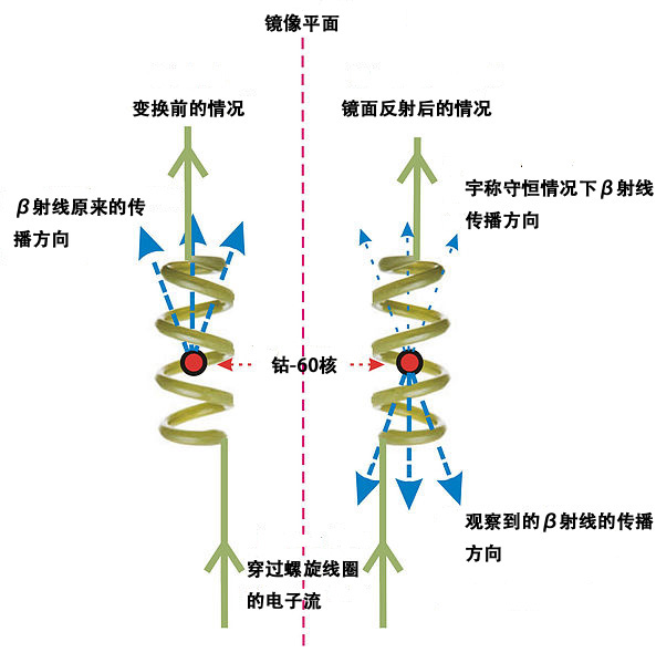 吴健雄验证弱相互作用中宇称不守恒实验结果示意图